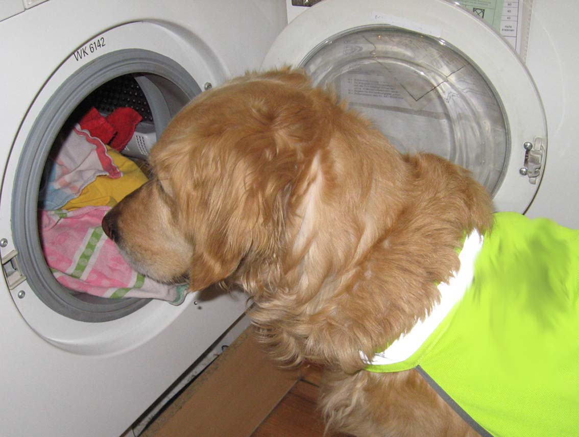 Shacky beim Ausräumen der Waschmaschine